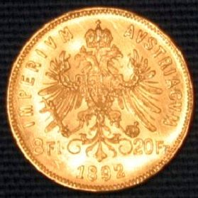 Austria: 8 florins / 20 francs 1892, KM# 2269